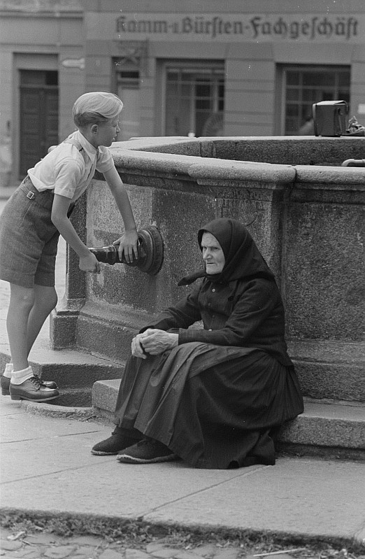 Original image description from the Deutsche Fotothek Porträt einer alten Frau an einem Brunnen